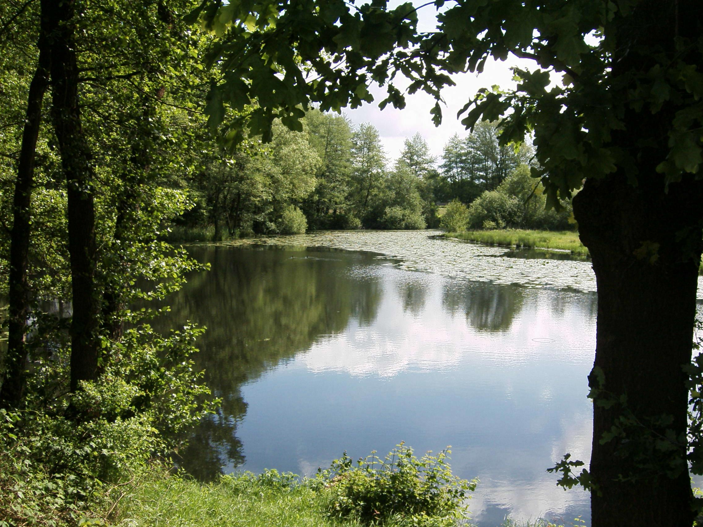 Altarm der oberen Ems in Rheine, in/bei Elte